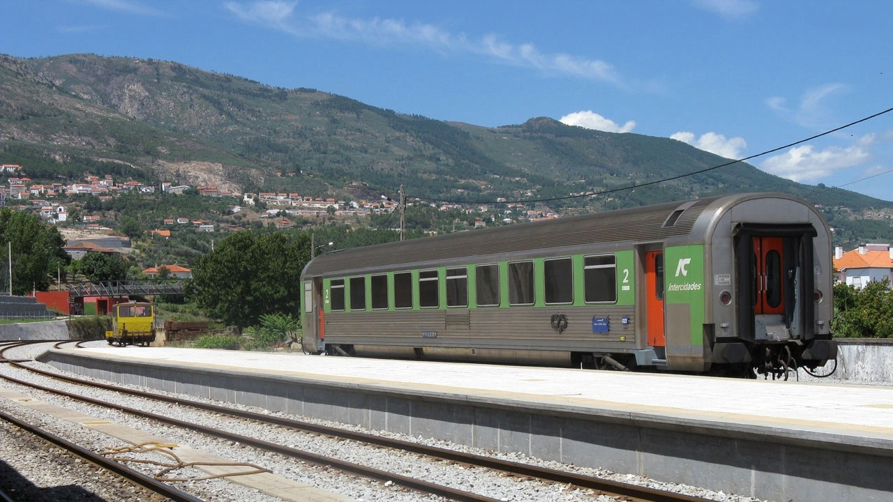 Corail de 2ª Classe na Covilhã